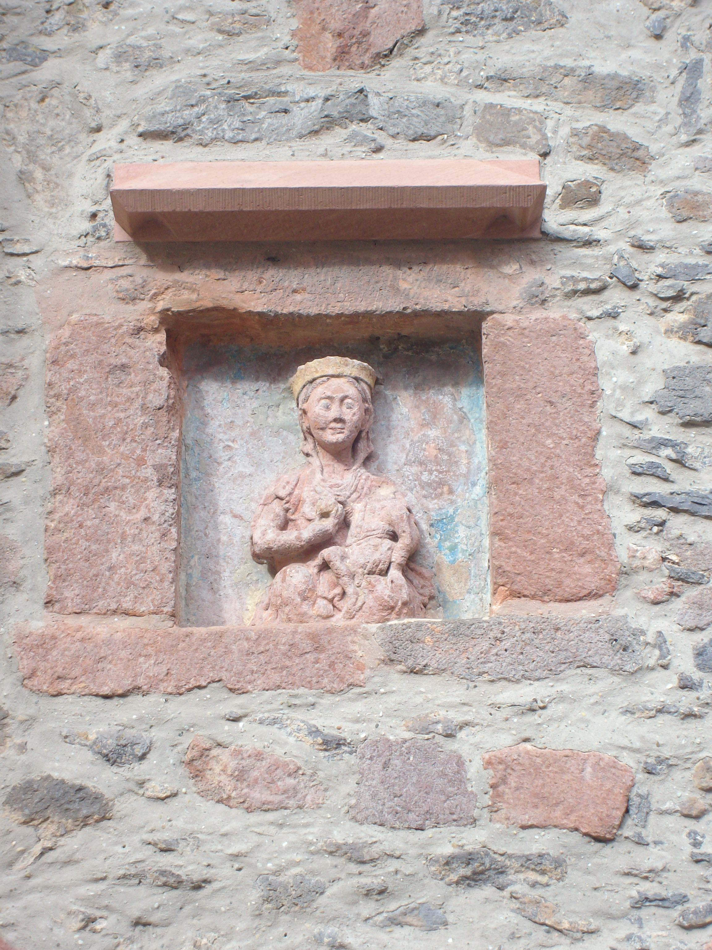 Madonna in der Südseite des Querschiffs der Evang. Stadtkirche in Laubach, Hessen